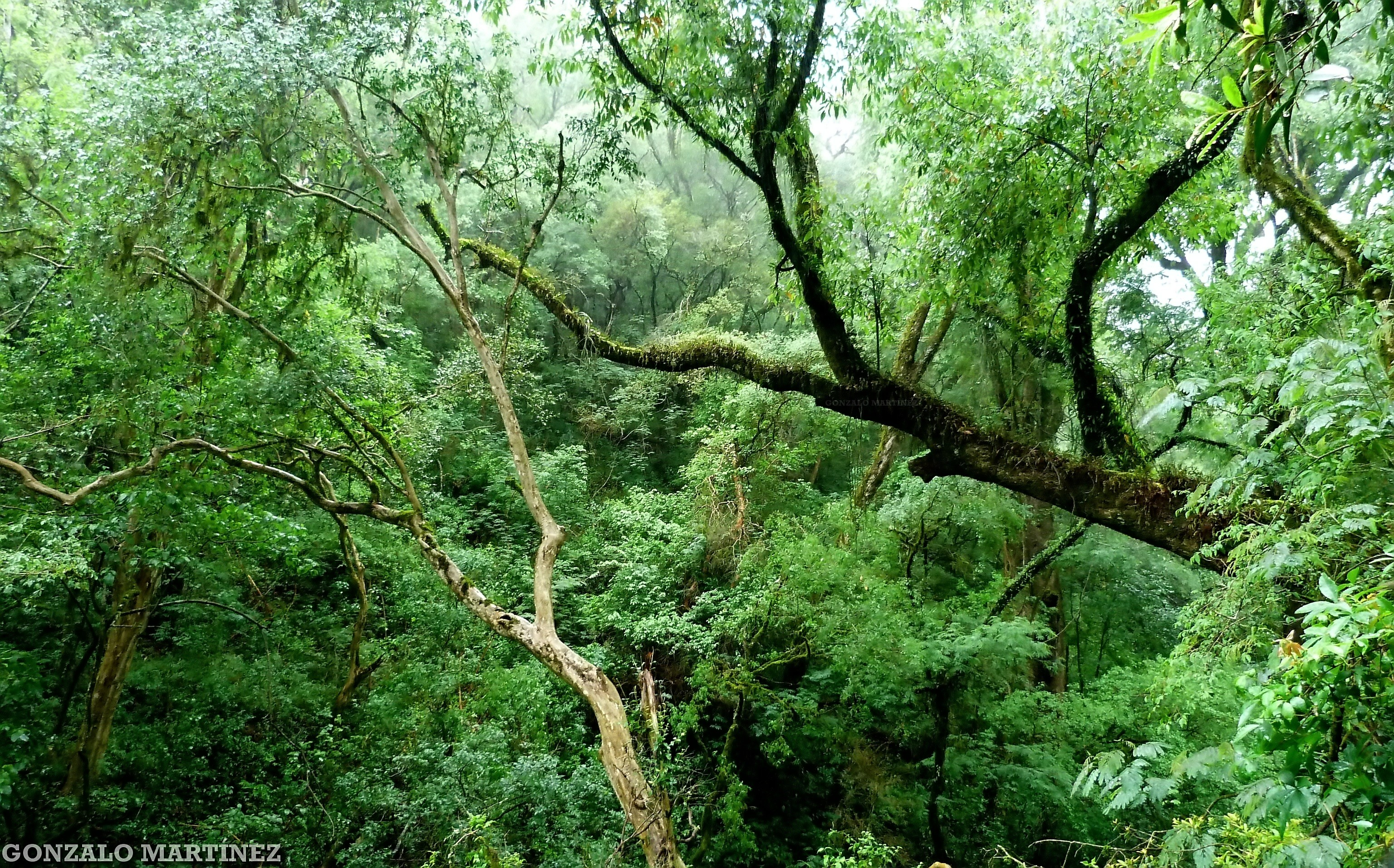 En la selva montana de las Yungas por la cuesta del Totoral, provincia de Catamarca, Argentina. Foto: Gonzalo Martínez